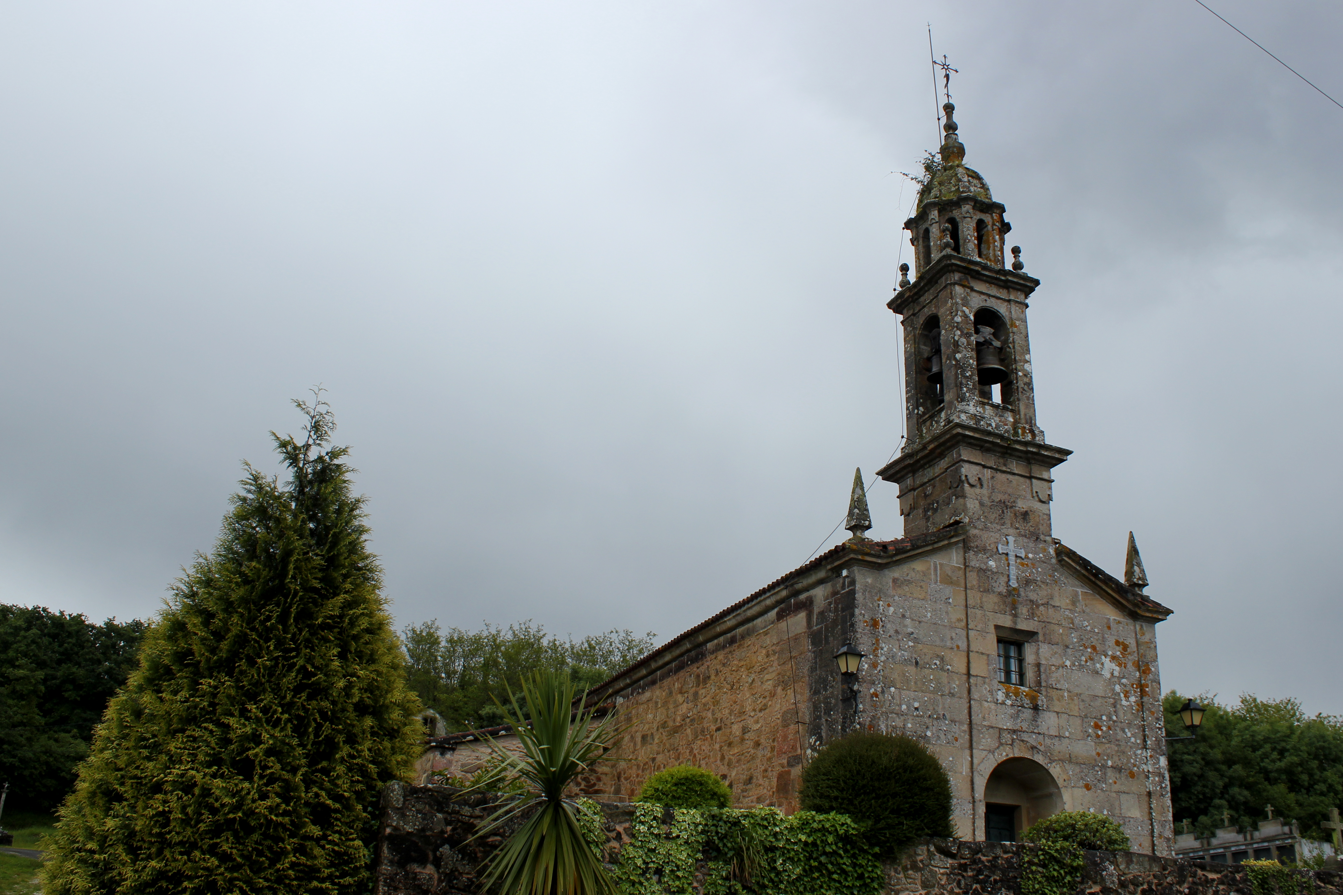 Igrexa de Illobre, Vedra.